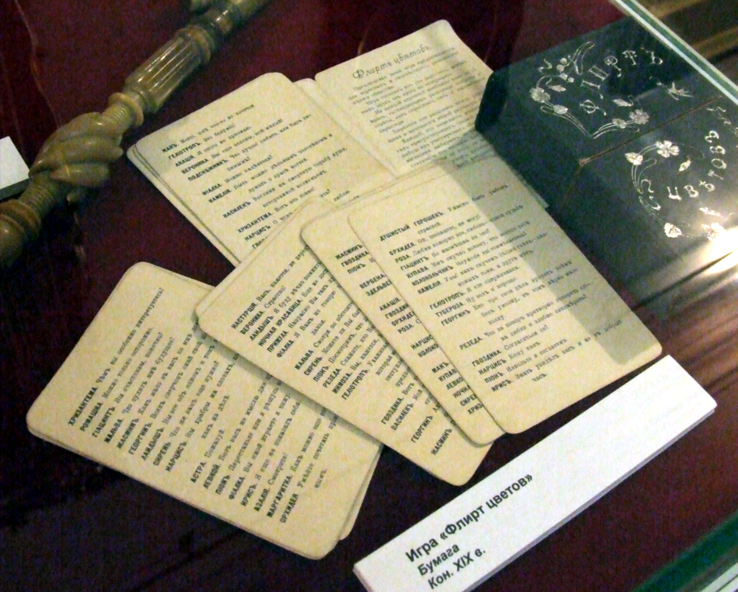 Игра "Флирт цветов", Россия, 19 век. Музей Кузьминки